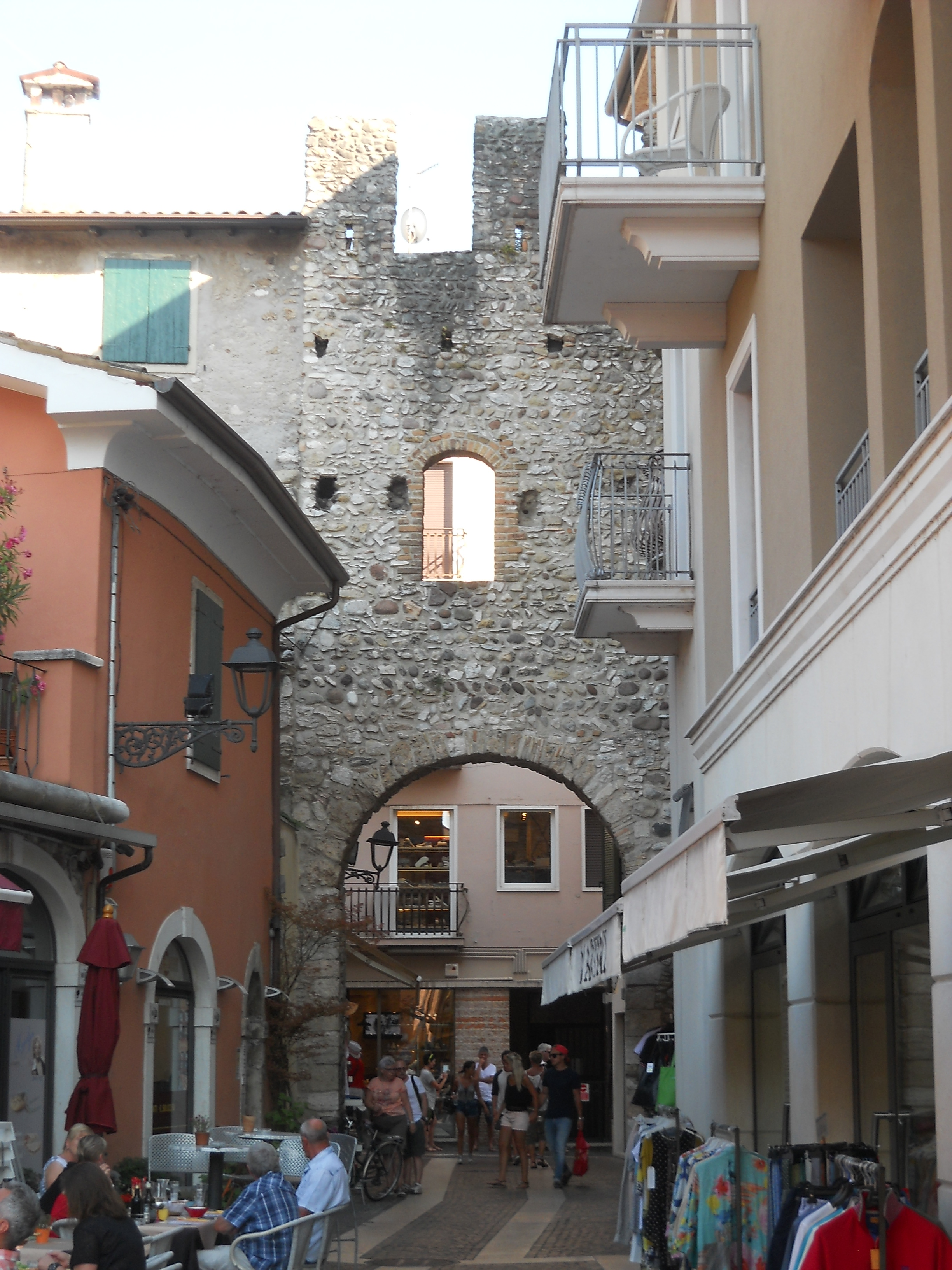 Antica porta medievale di San Giovanni a Bardolino